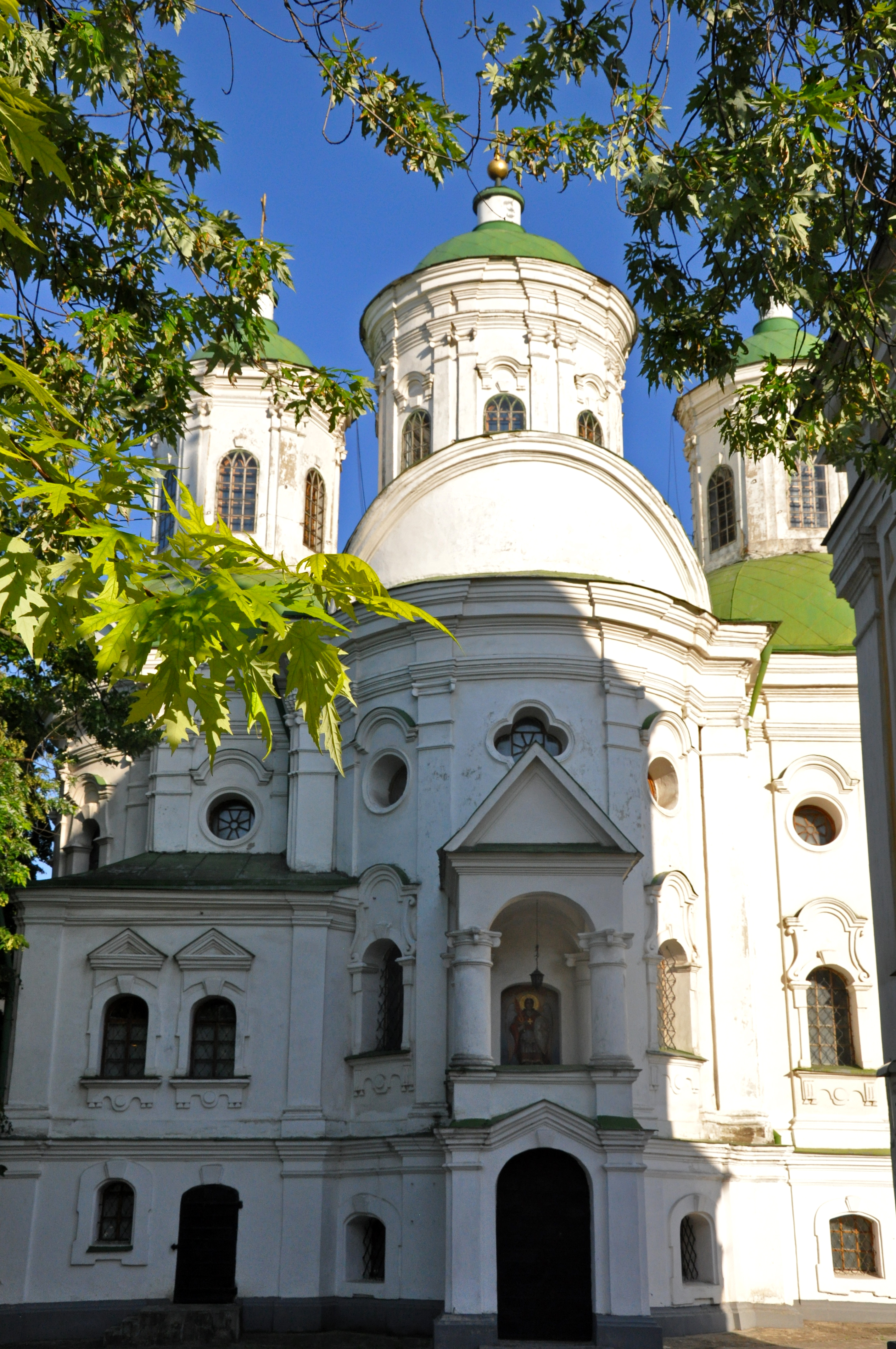 Покровська церква в Києві на Подолі